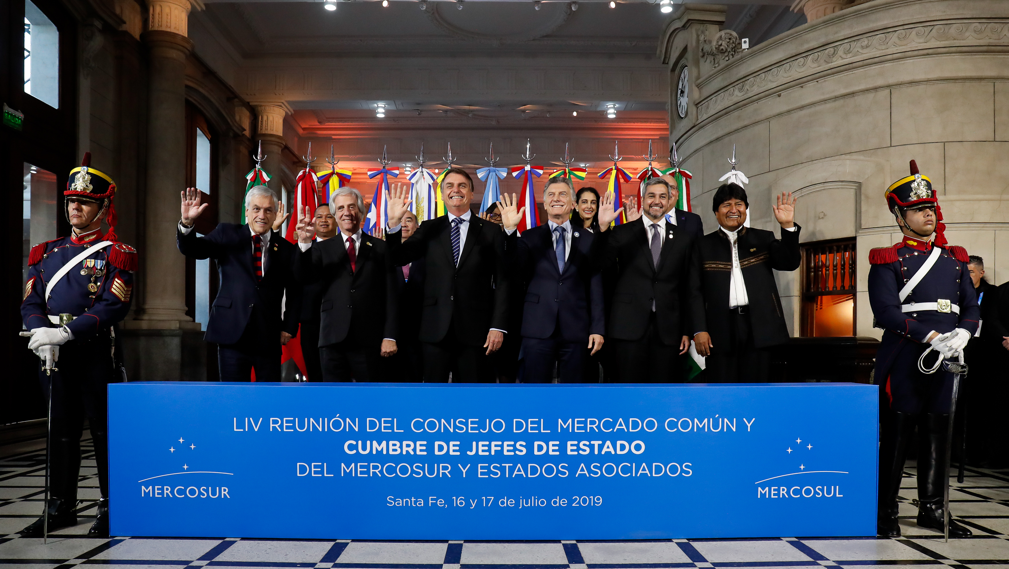 (Santa Fé - Argentina, 17/07/2019) Presidente da República Jair Bolsonaro posa para foto com os demais Chefes de Estado e de Governo do Mercosul.Foto: Alan Santos/PR